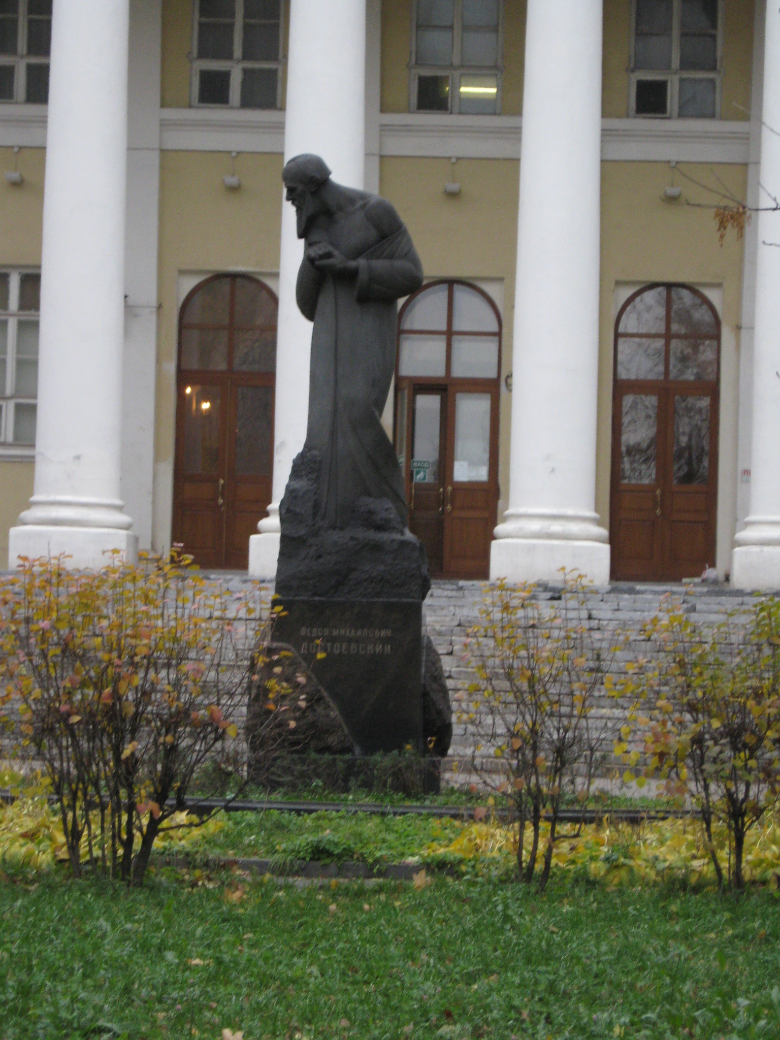 Федор Михайлович Достоевский